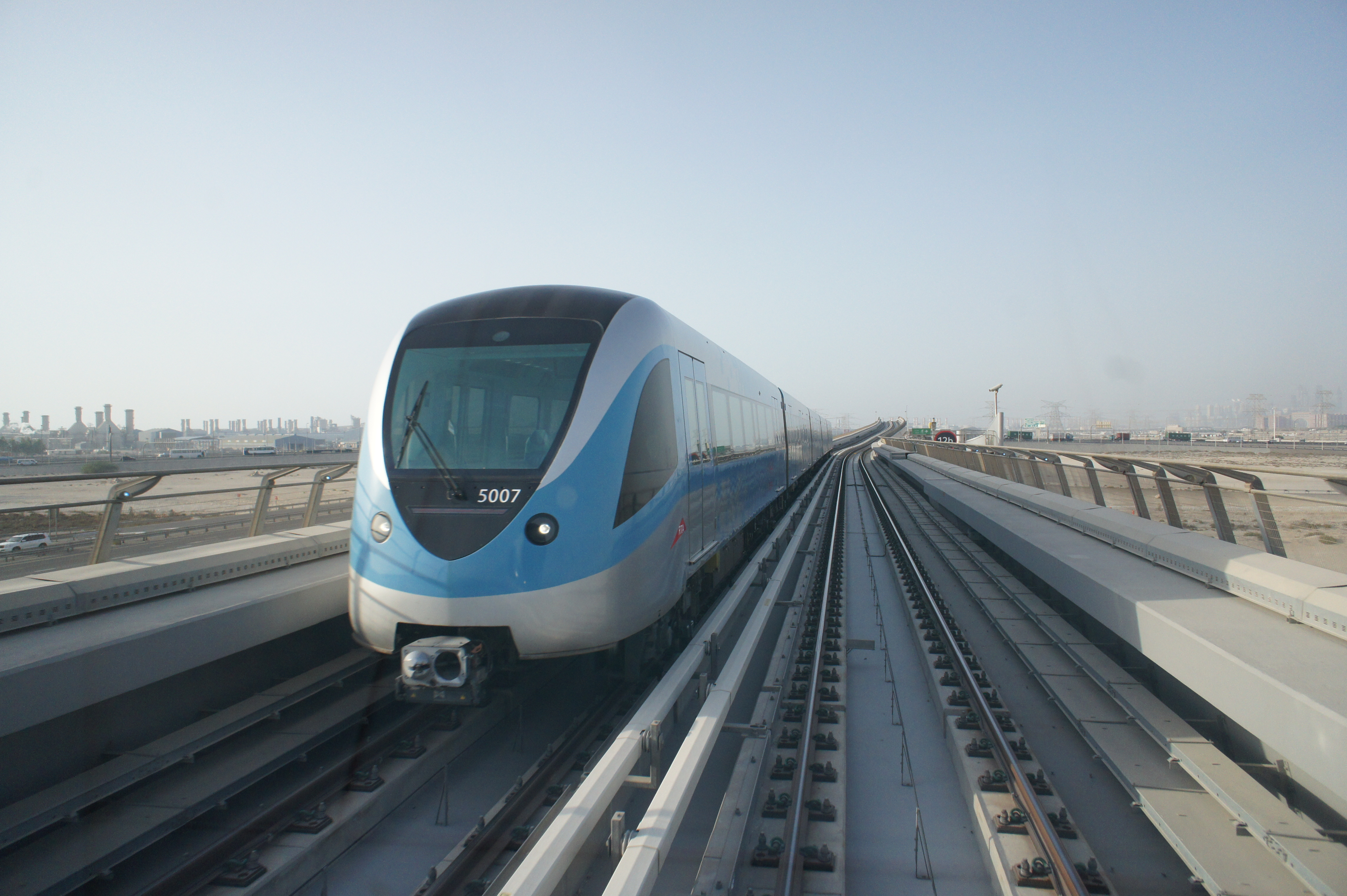 ドバイ・メトロ